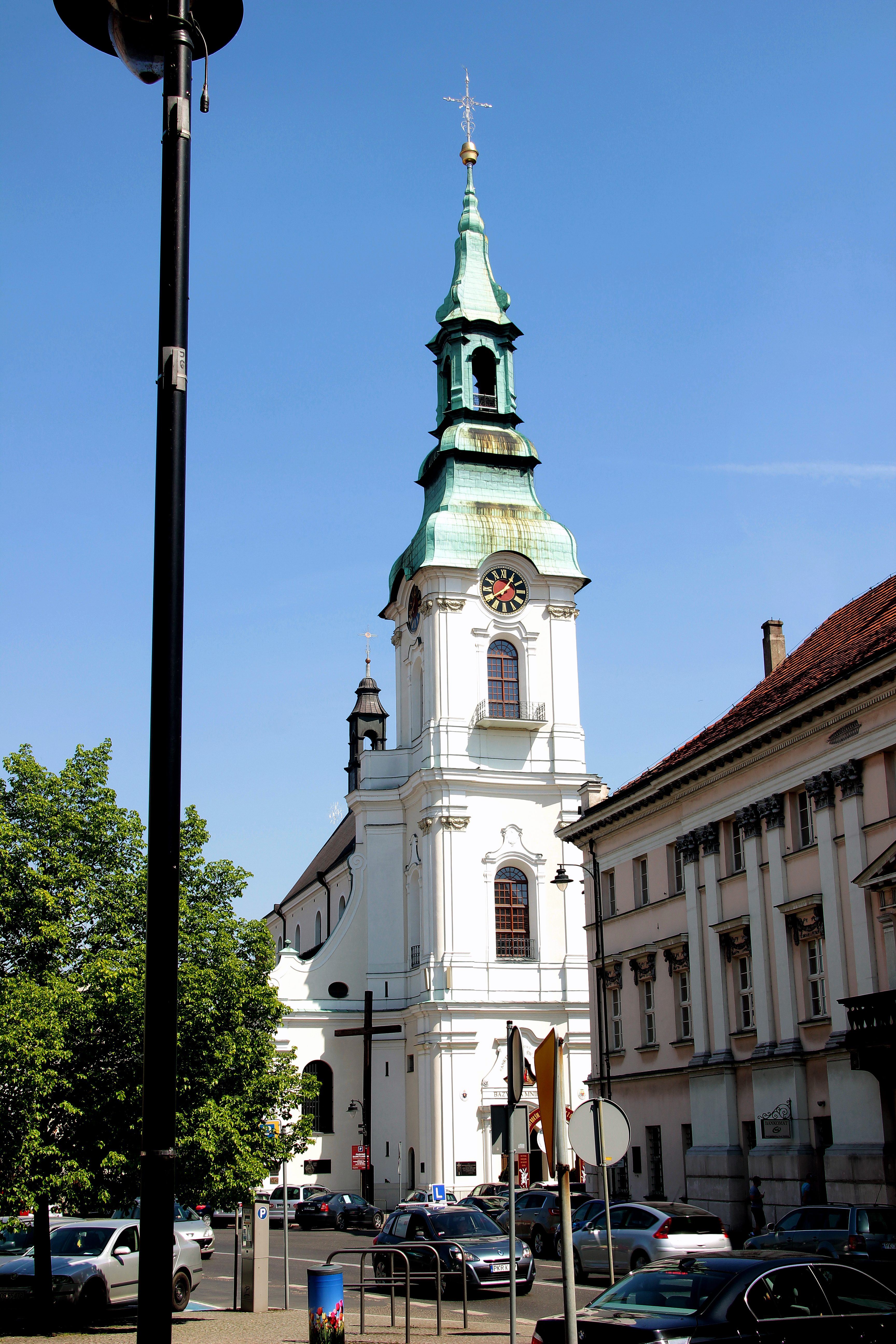 Template:PlX-plener